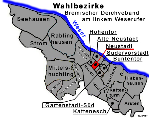 Wahlbezirke-im Deichverband Lks der Weser